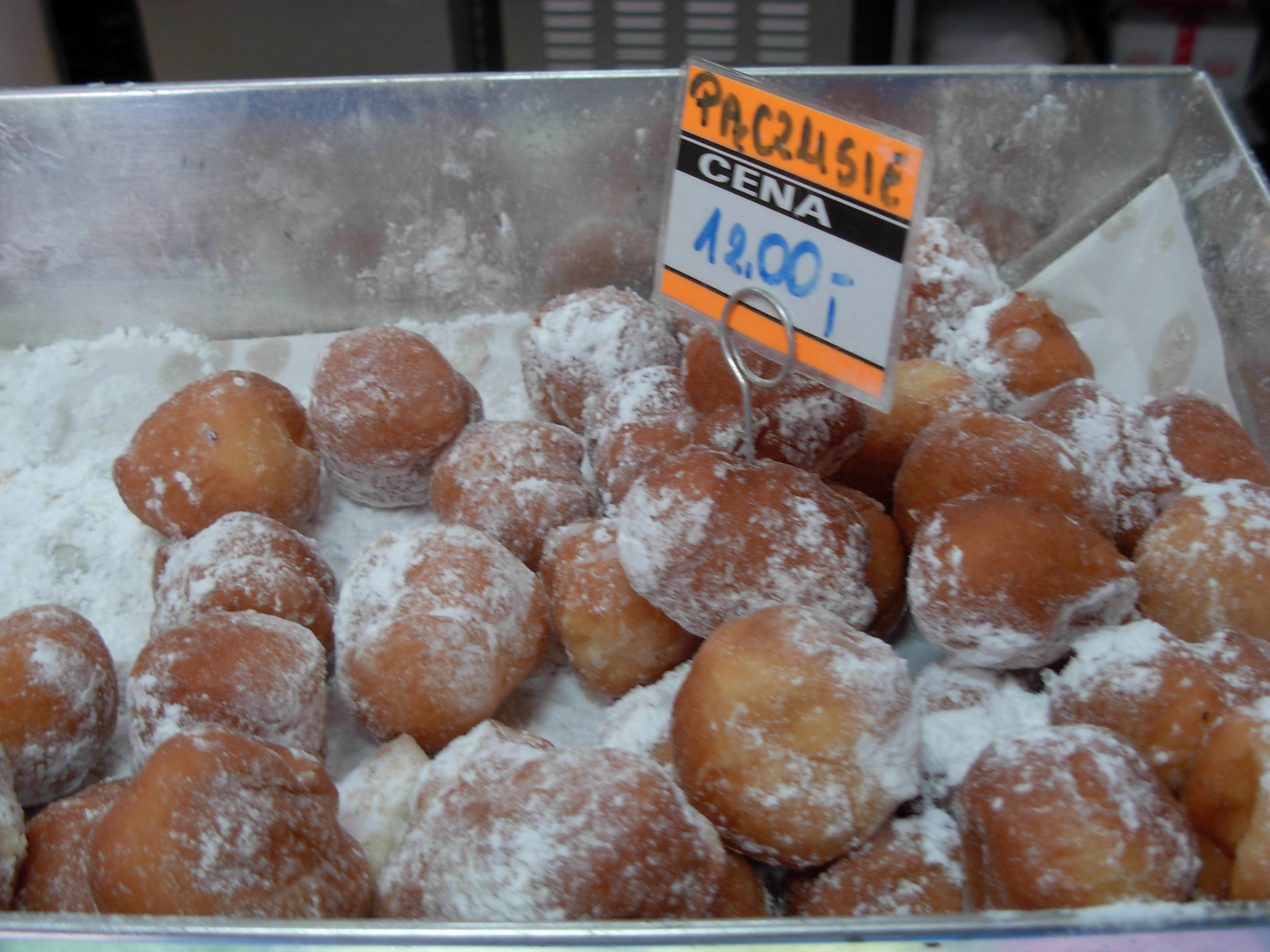 Pączusie (Polish: Small pączki)